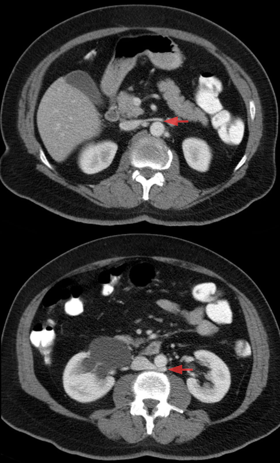 Teilweise retroaortaler Verlauf der linken Nierenvenen: oberes Bild schmaler präaortaler Anteil, unteres Bild mit retroaortalem Anteil. Computertomographie axial. In den Schichten ist nicht der ganze Verlauf bis zur Niere zu sehen.